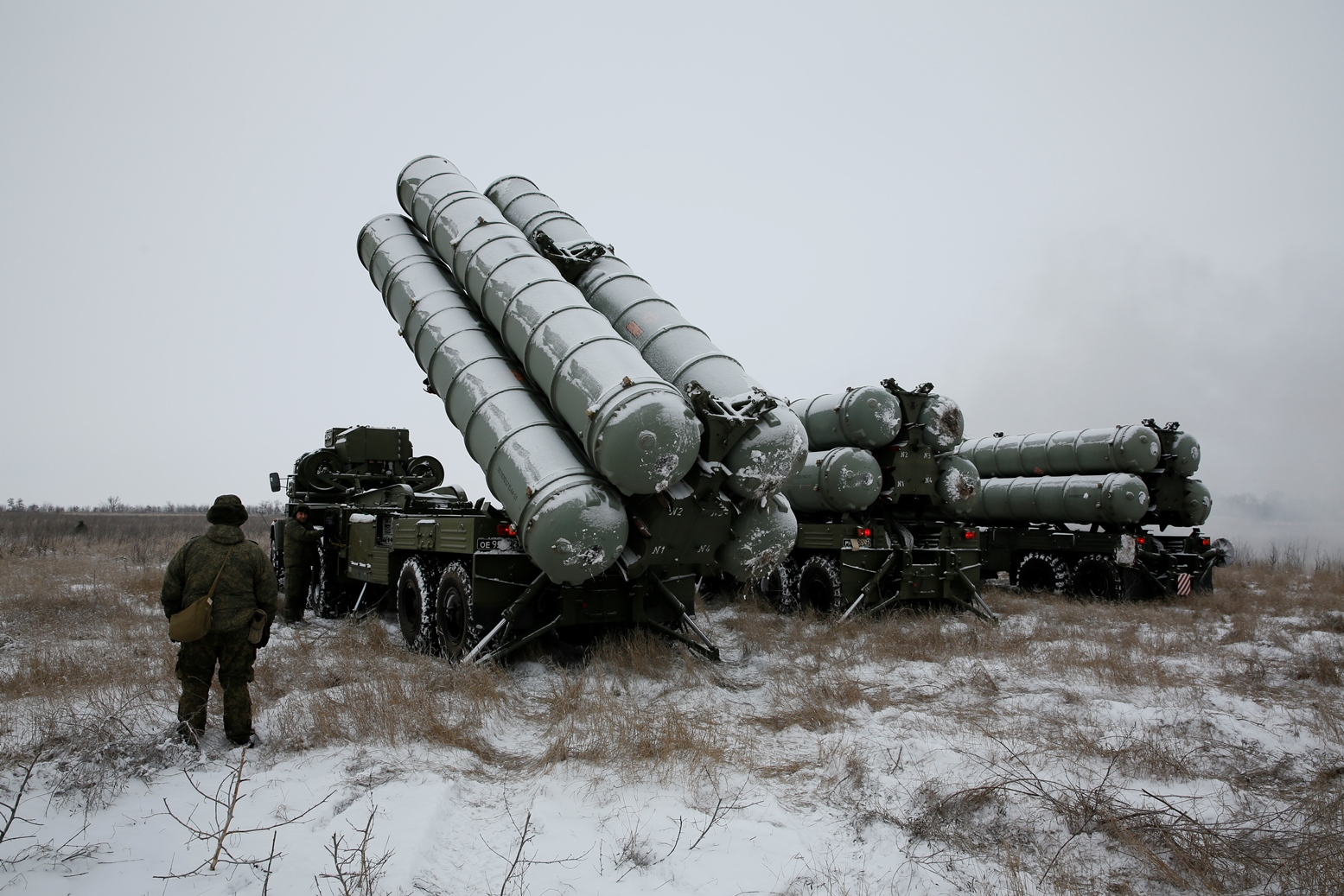 Учение зенитчиков 1536-го зенитного ракетного полка 51-й дивизии ПВО с применением С-300ПМ1 в Ростовской области.